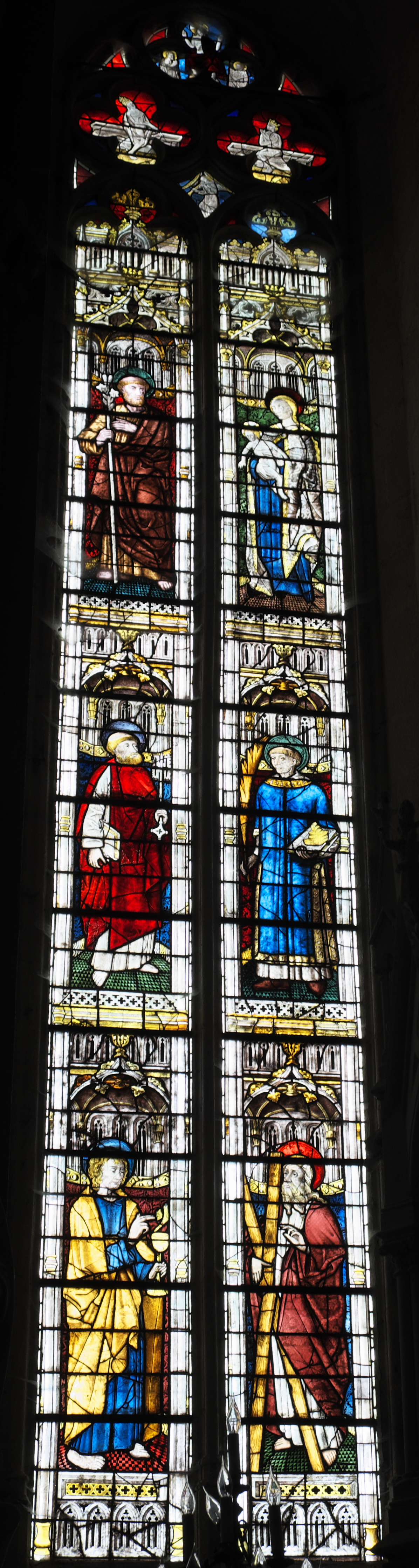 Stiftskirche Saint-Étienne in Eymoutiers im Département Haute-Vienne (Nouvelle-Aquitaine/Frankreich), Bleiglasfenster (Nr. 0) aus dem 15. Jahrhundert; Darstellung: Apostel Johannes (unten links), Apostel Andreas (unten rechts), Apostel Petrus (Mitte links), heiliger Stephanus (Mitte rechts), heiliger Joseph (oben links), Madonna mit Kind (oben rechts)